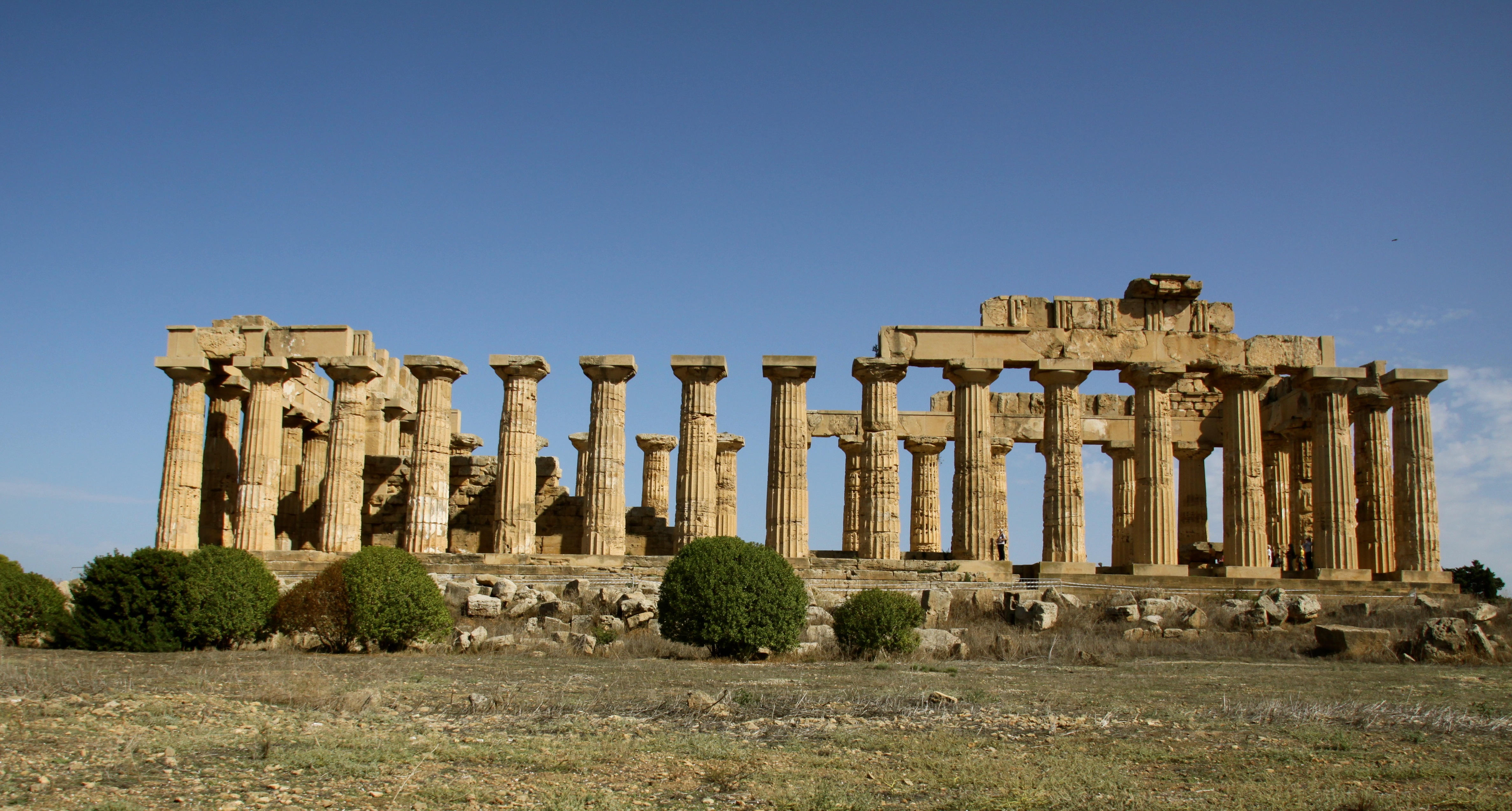 Temple E (Selinunte)